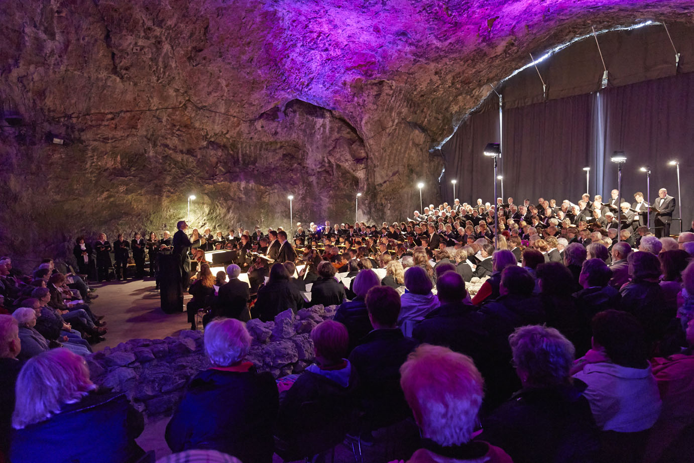 Guiseppe Verdi, Messa da Requiem.Balver Höhle 2014©